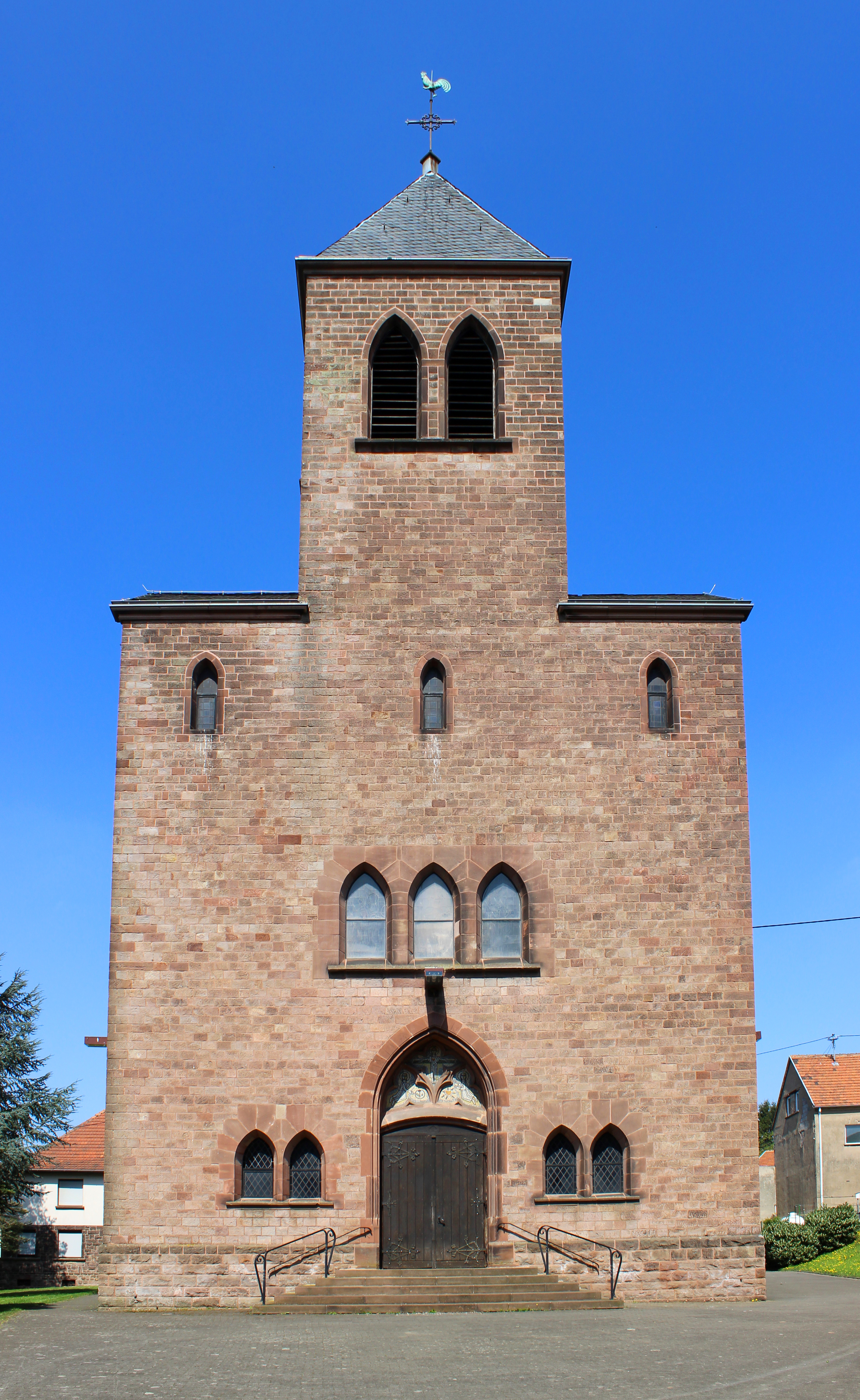 Die katholische Pfarrkirche Herz Jesu in Münchwies, einem Stadtteil von Neunkirchen/Saar.